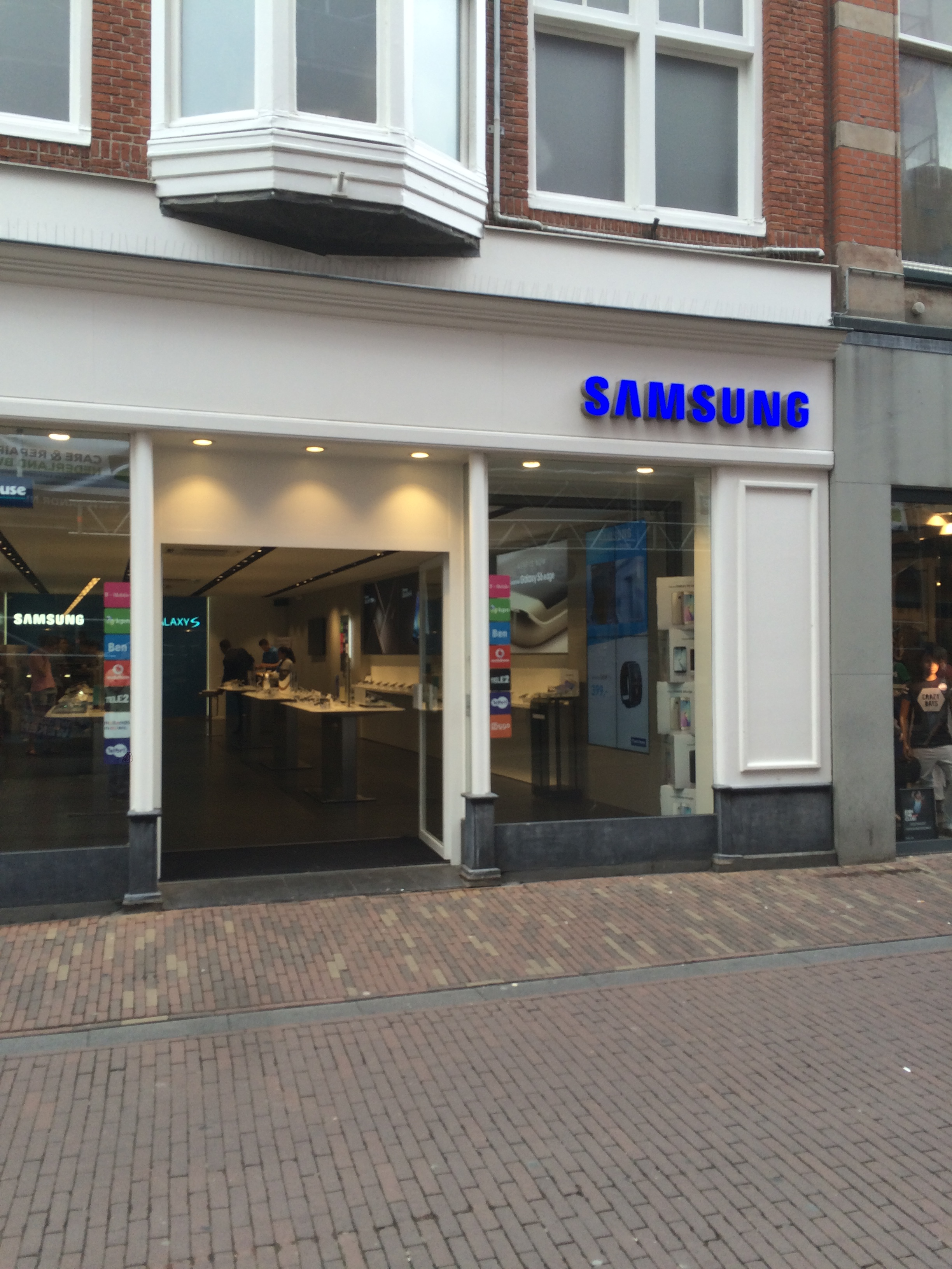 Samsung Store